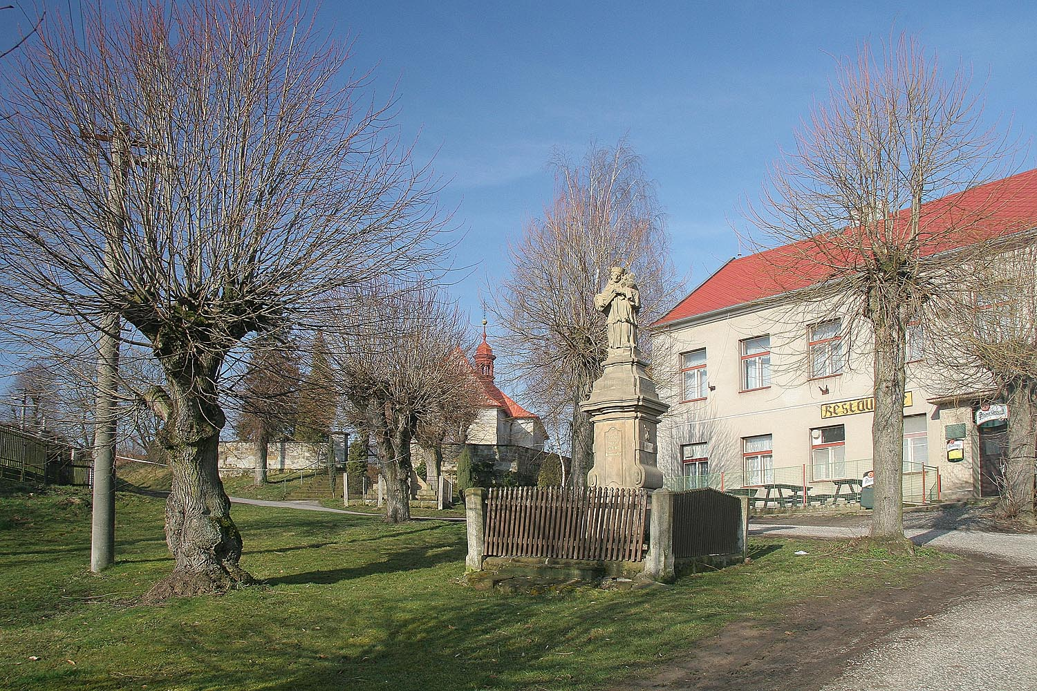 Náves se sochou sv. Jana Nepomuckého v obci Samšina, okres Jičín autor: Prazak date: 11. 3. 2007